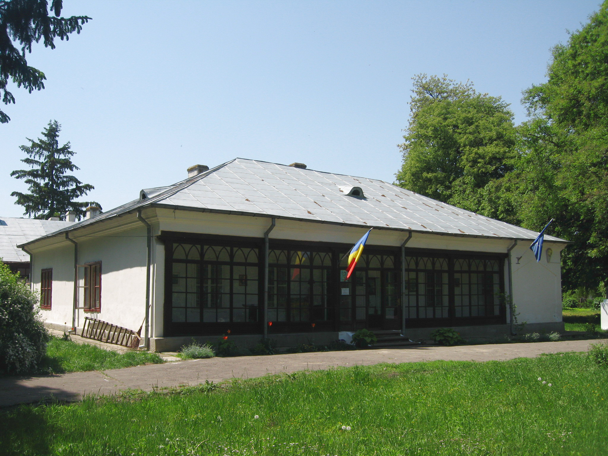 Casa memorială Vasile Alecsandri de la Mirceşti